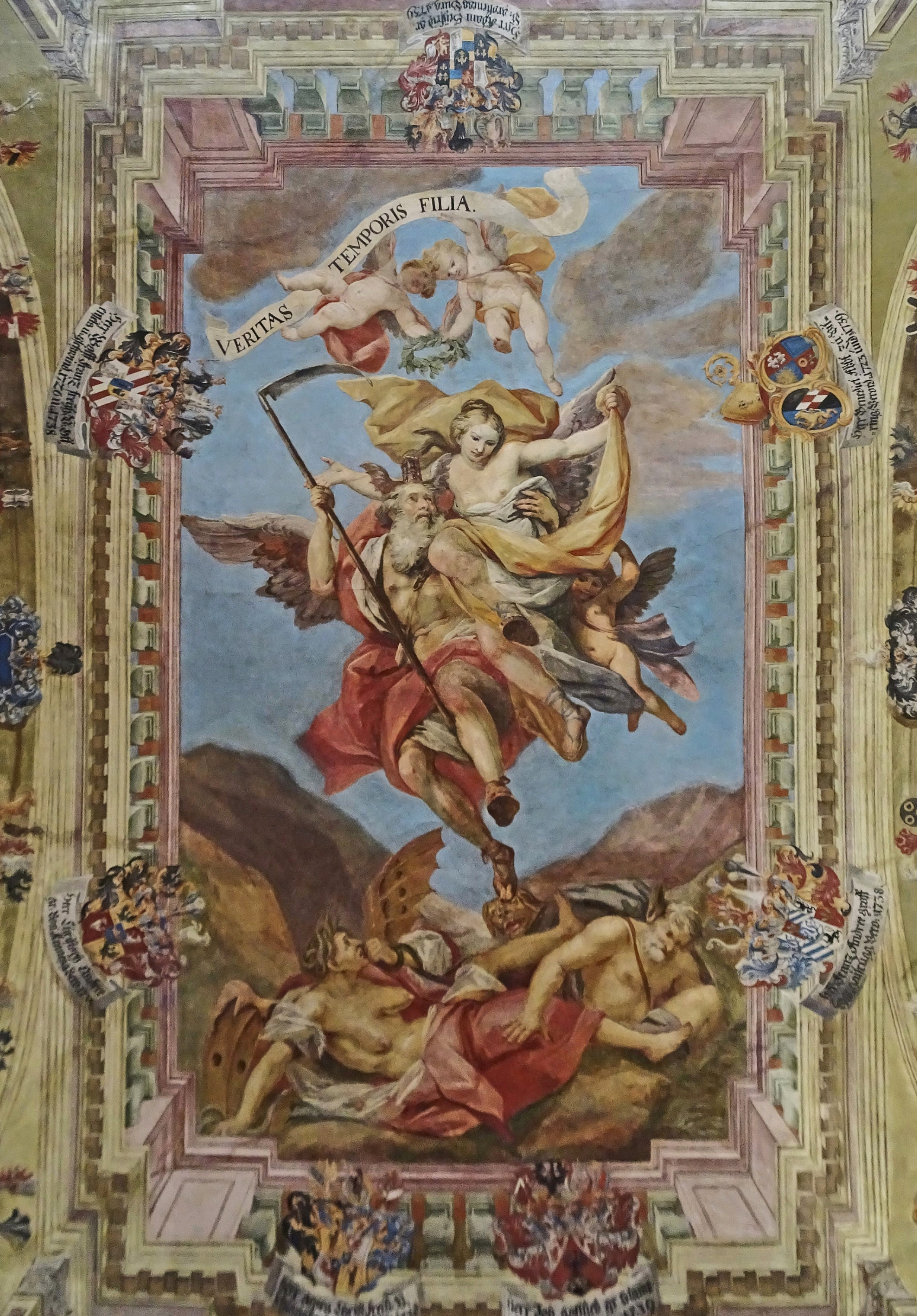 Landhaus, Fromillers Deckengemälde im kleinen Wappensaal: "Die Wahrheit ist eine Tochter der Zeit".